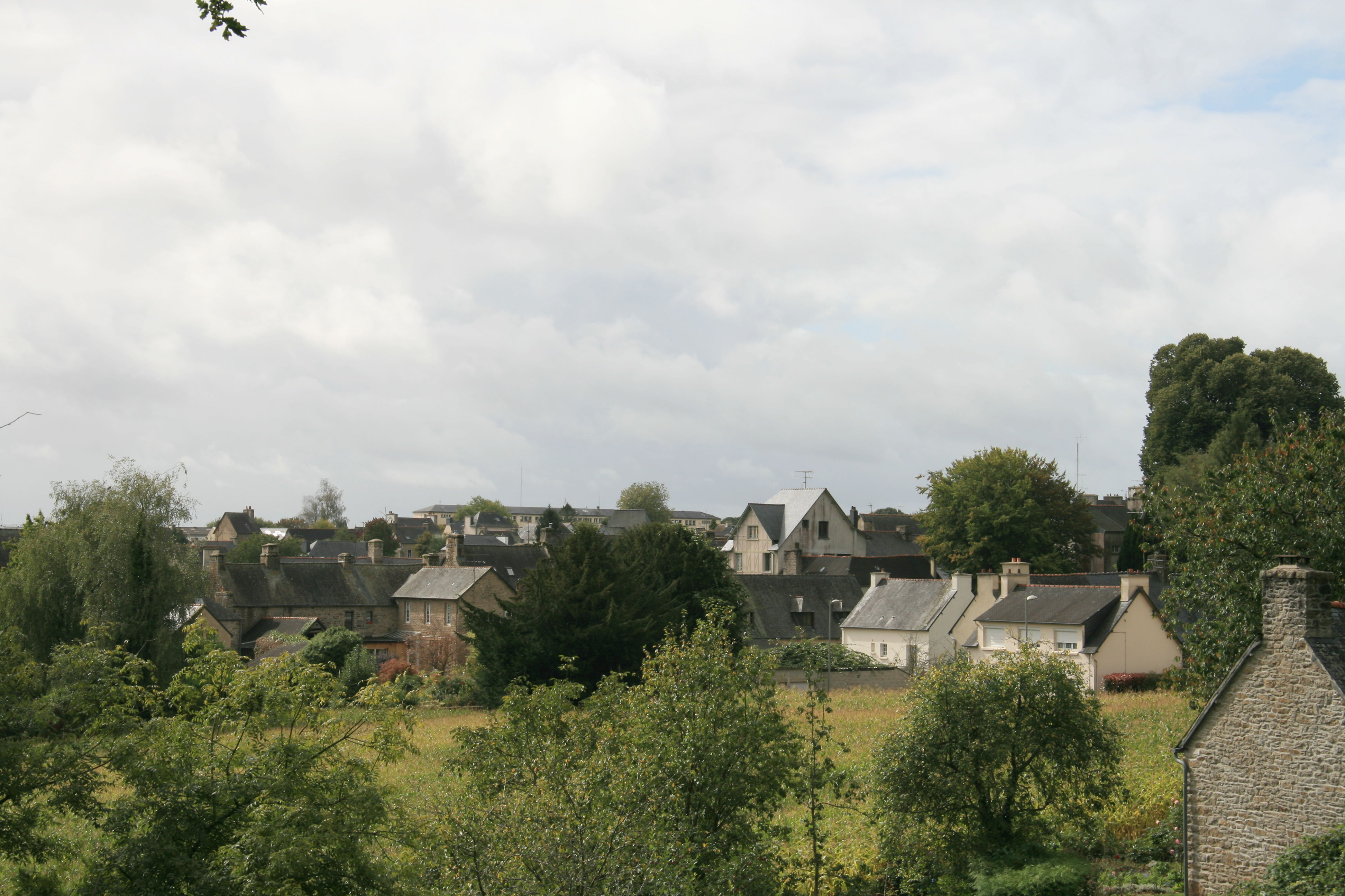 Vue de Saint Nicolas du Pélem - France